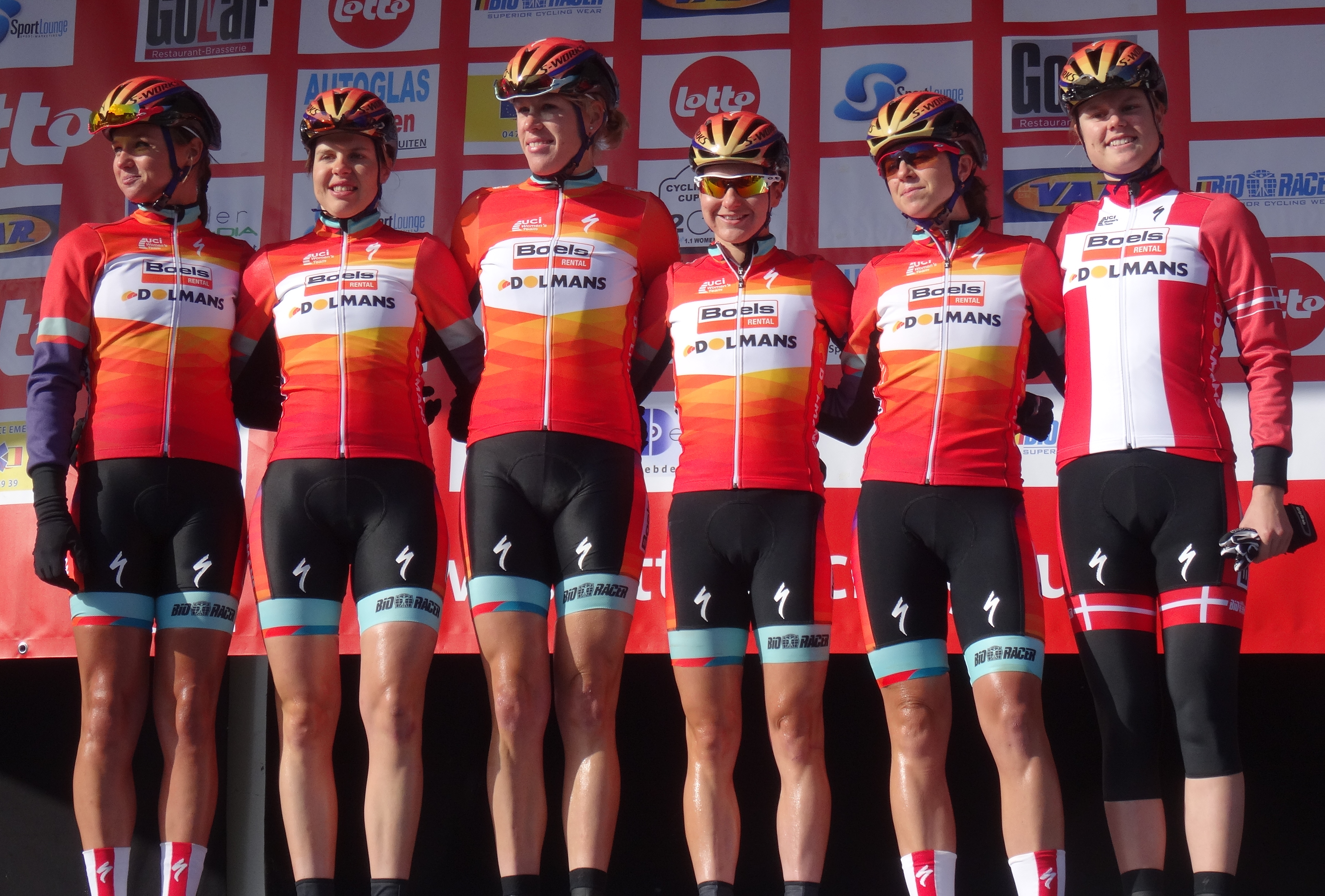 Reportage réalisé le mercredi 4 mars à l'occasion du départ du Samyn des Dames 2015 et du Samyn 2015 à Quaregnon, Belgique.